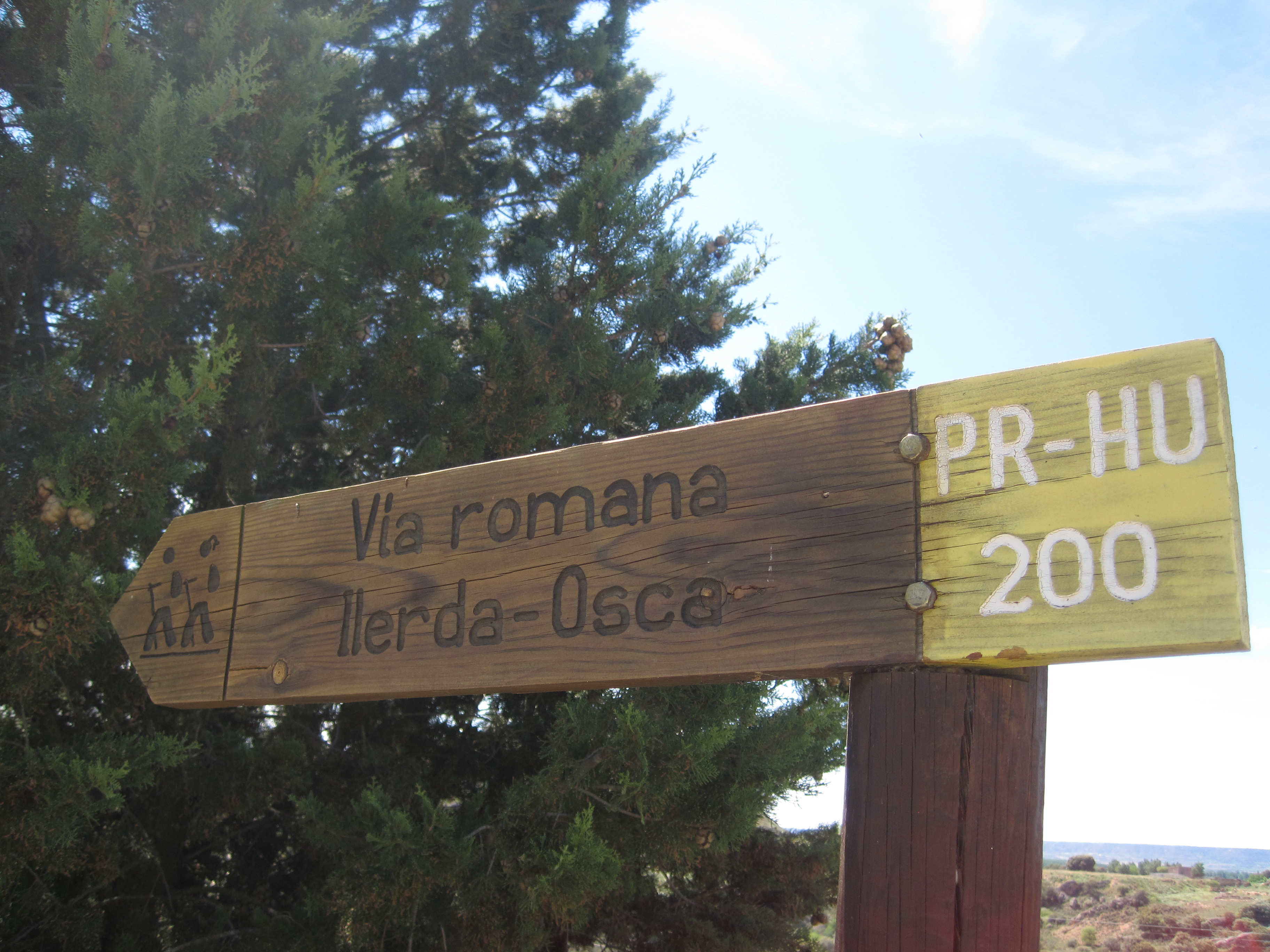 Aragonés: Vía romana "Ilerda-Osca". Castillón d'o Puent, Semontano de Balbastro, Aragón.